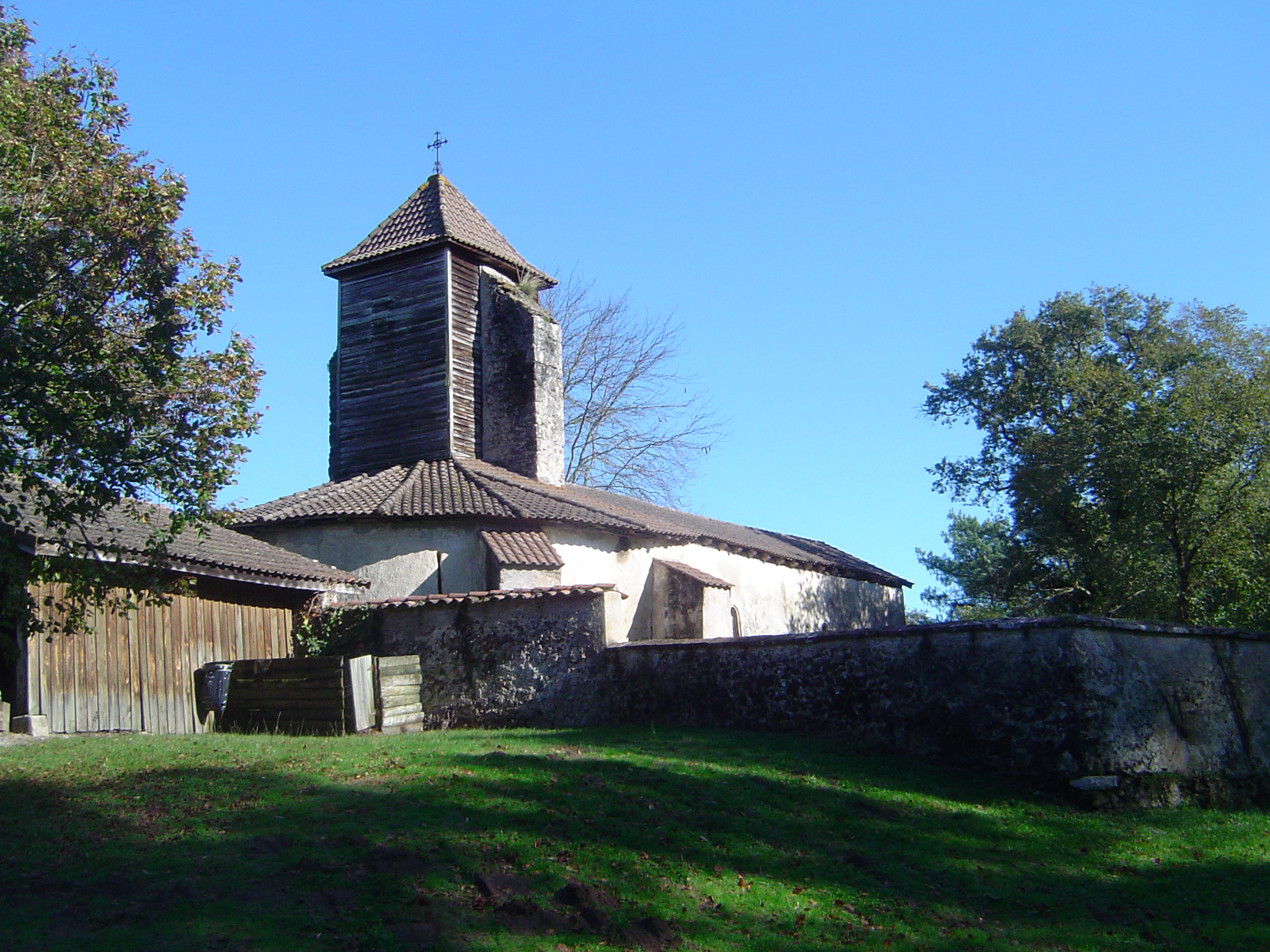 glèisa de St Miquèu de Giure; St Miquèu-Escalús; Gasconha